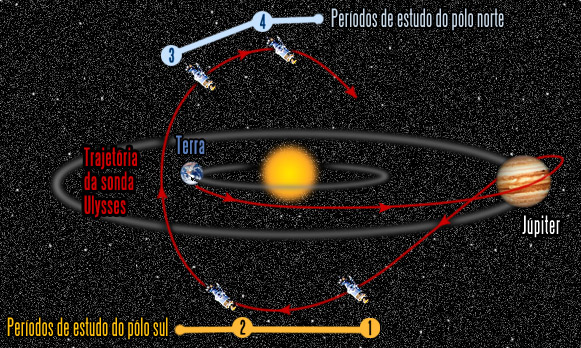 TrajetÃ³ria da sonda Ulysses